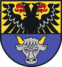 Wappen Eßlingen bei Bitburg